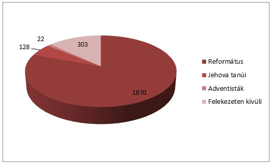 Csongor felekezeti megoszlása (2013)